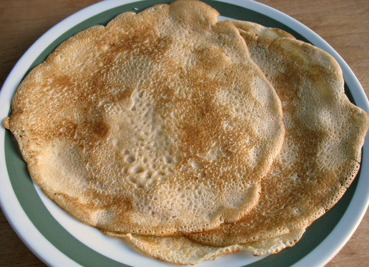 Blynai